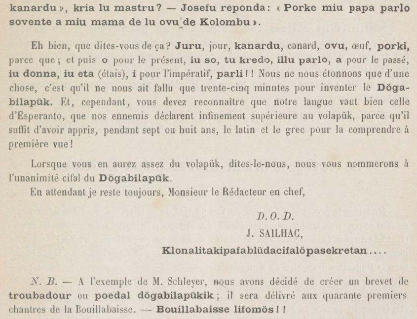 Extrach de la revista "le volapük" sus lo döganilapük. (1889)